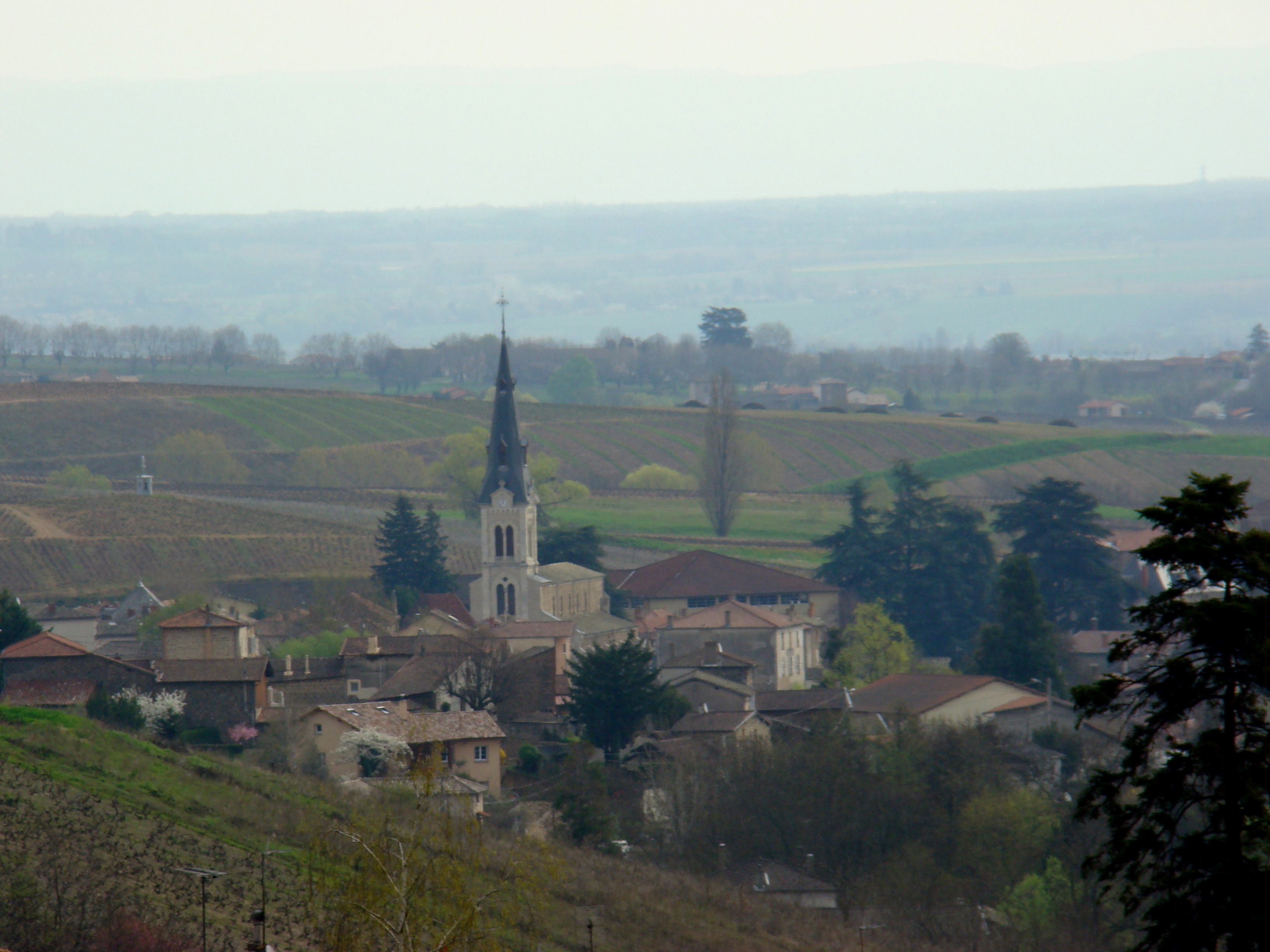 Le Perréon vu de La Creuse.